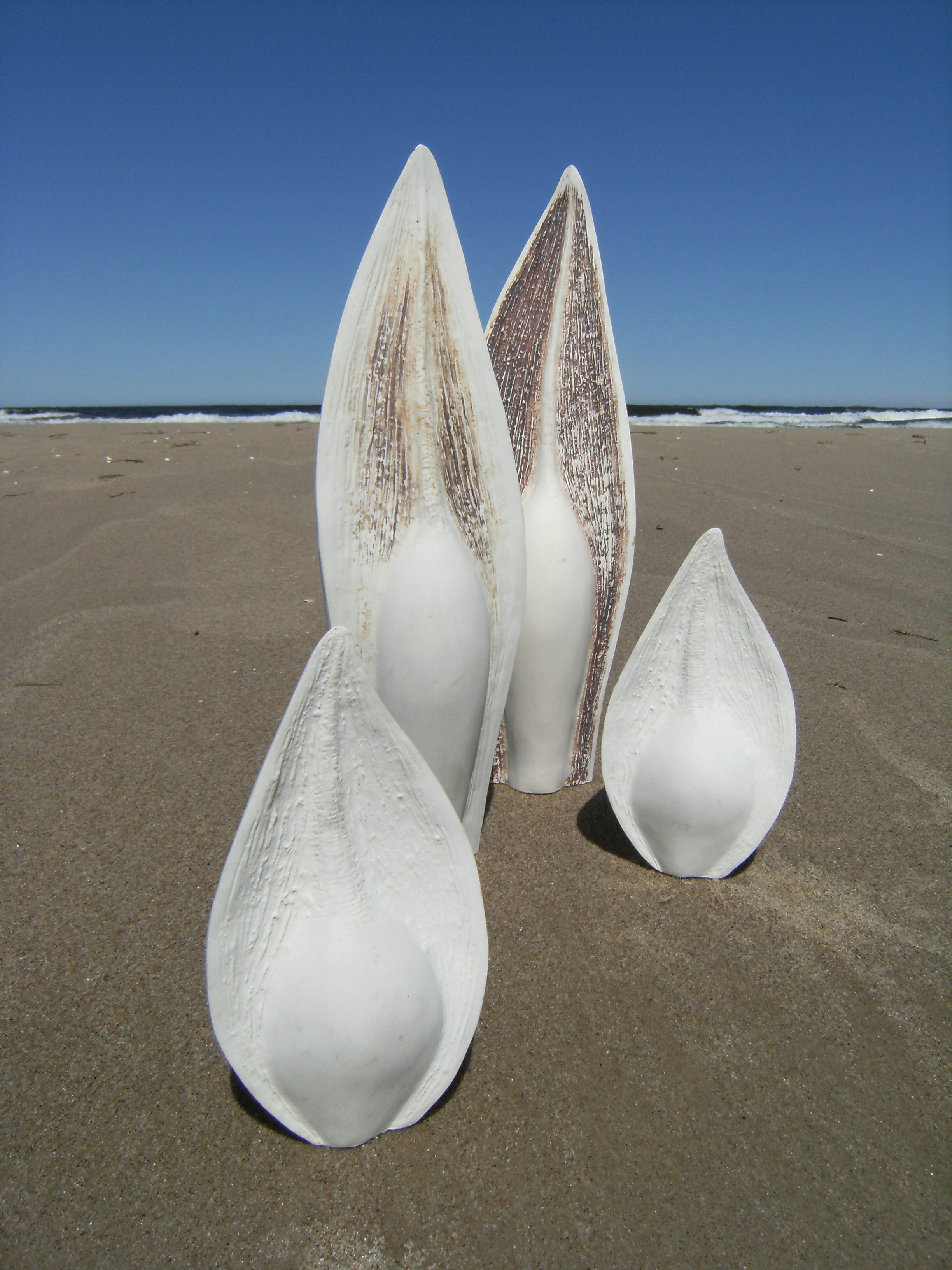 Ceramika Artystyczna, autorka Krystyna Andrzejewska-Marek.